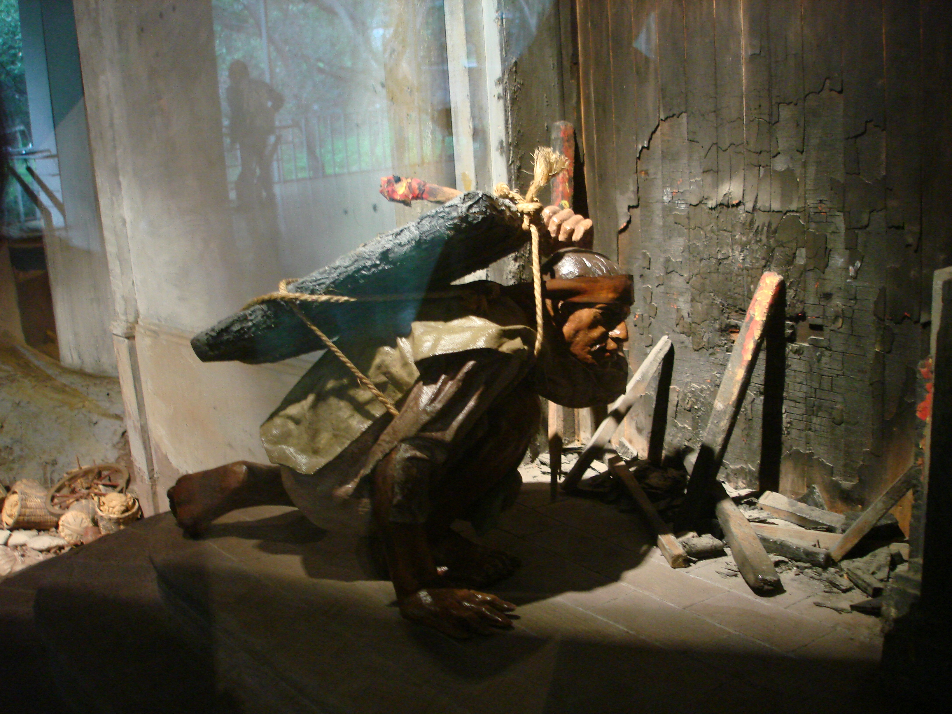 El Pípila, detalle del diorama en el Museo del Caracol de la Ciudad de México sobre el asalto a la Alhóndiga de Granaditas en 1810.